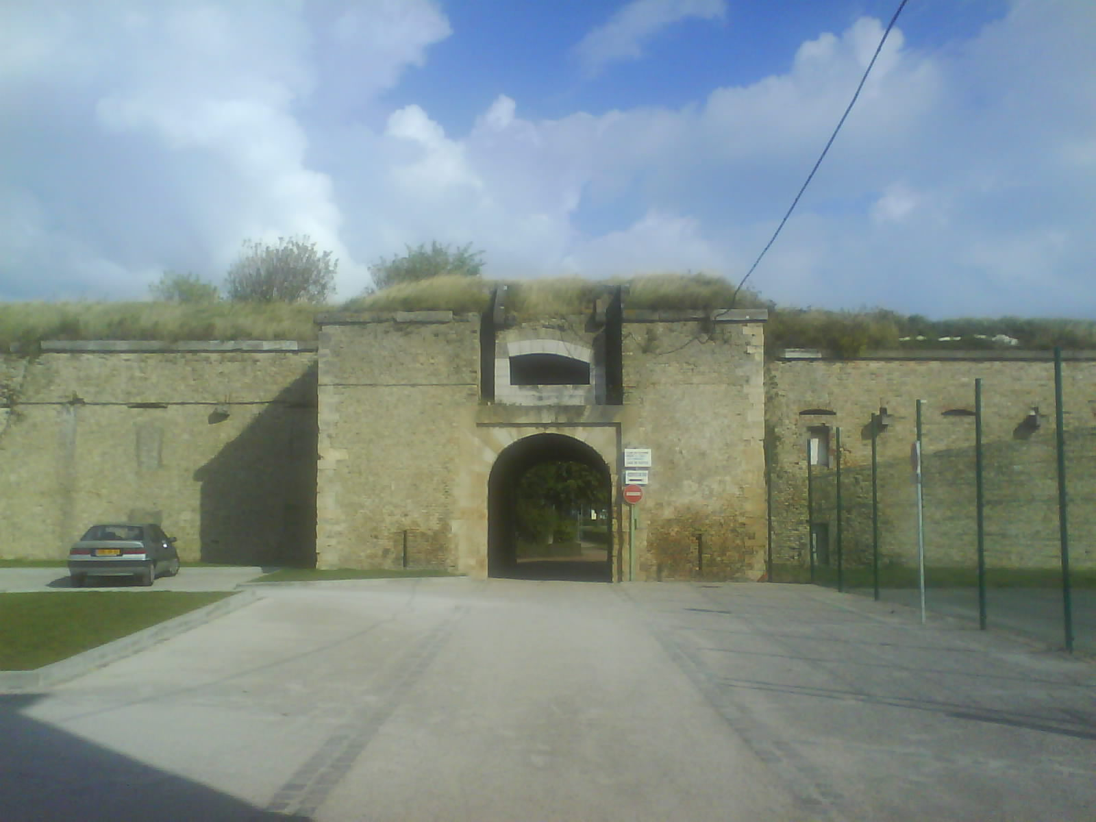 La Porte de Boulogne, qui donne accès par le Sud à la Citadelle de Calais Informations Description Photo de La Porte de Boulogne, de la Citadelle de Calais. DatePhoto prise le 11/09/2008 à 10:57 à Calais.SourceOwn work by the original uploaderAuthorfr:Utilisateur:Davy-62Permission(Reusing this file) Publié sous CC-BY-SA-2.0 Object location50° 57′ 28.08″ N, 1° 50′ 42.72″ E View all coordinates using: OpenStreetMap - Google Earth Photo de La Porte de Boulogne, de la Citadelle de Calais.